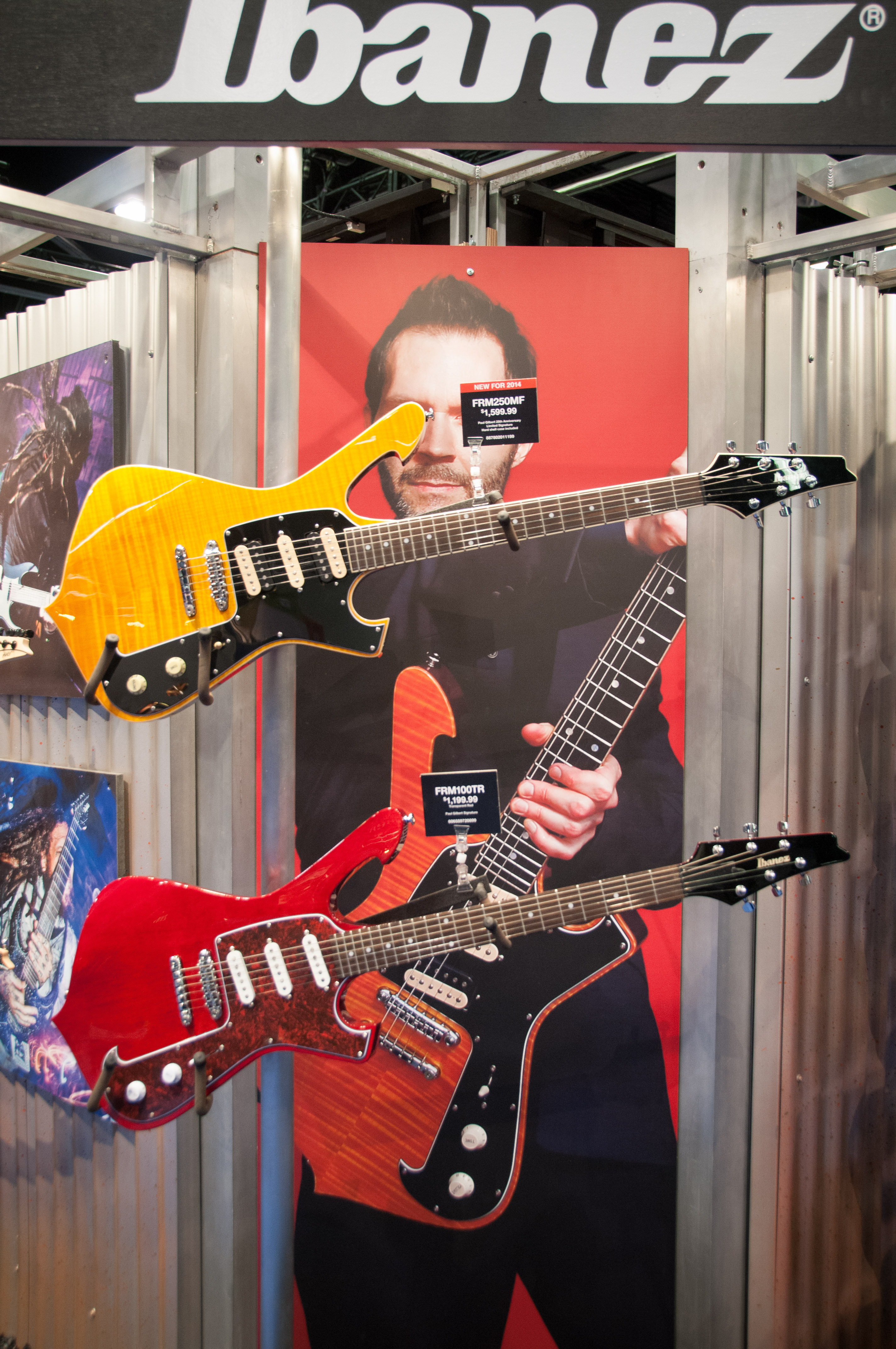 New Ibanez Paul Gilbert model